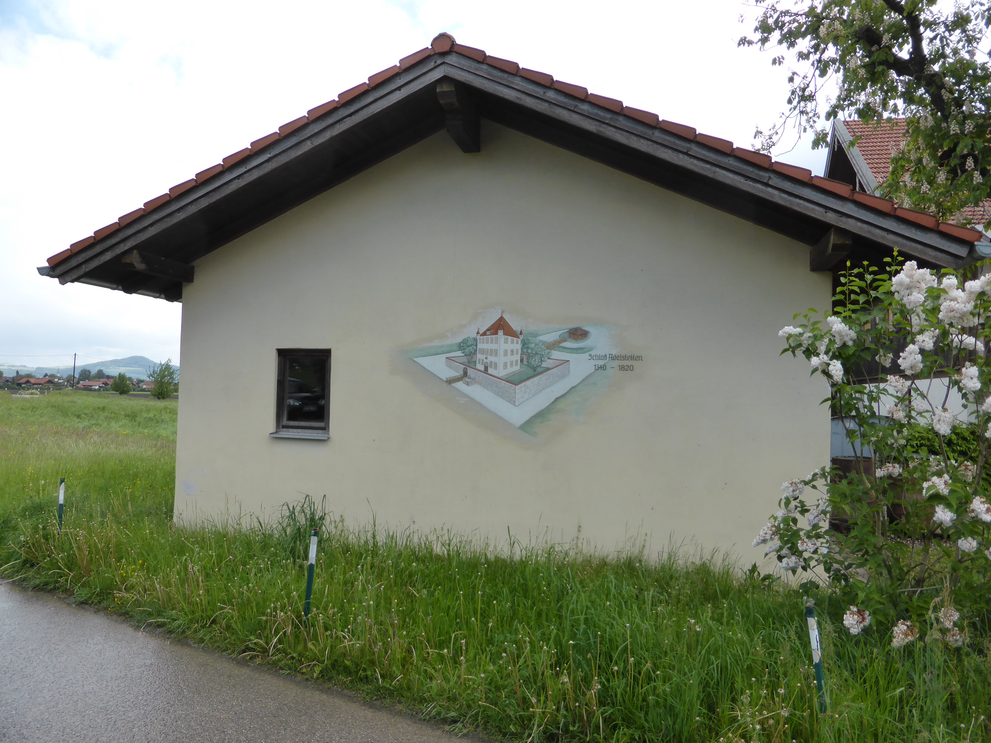 abgegangenes Schloss Adelstetten